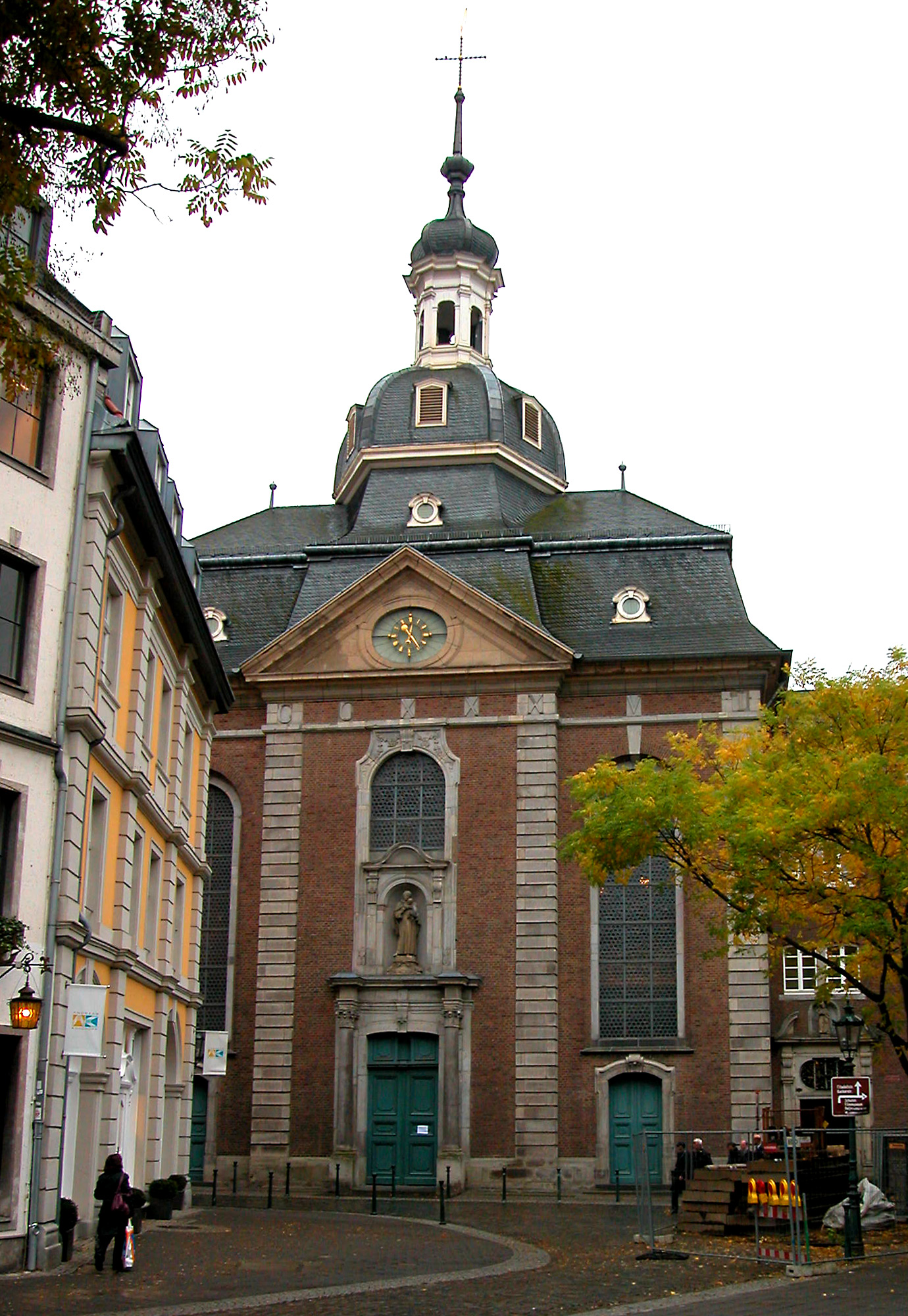 St. Maximilian in Düsseldorf, Deutschland